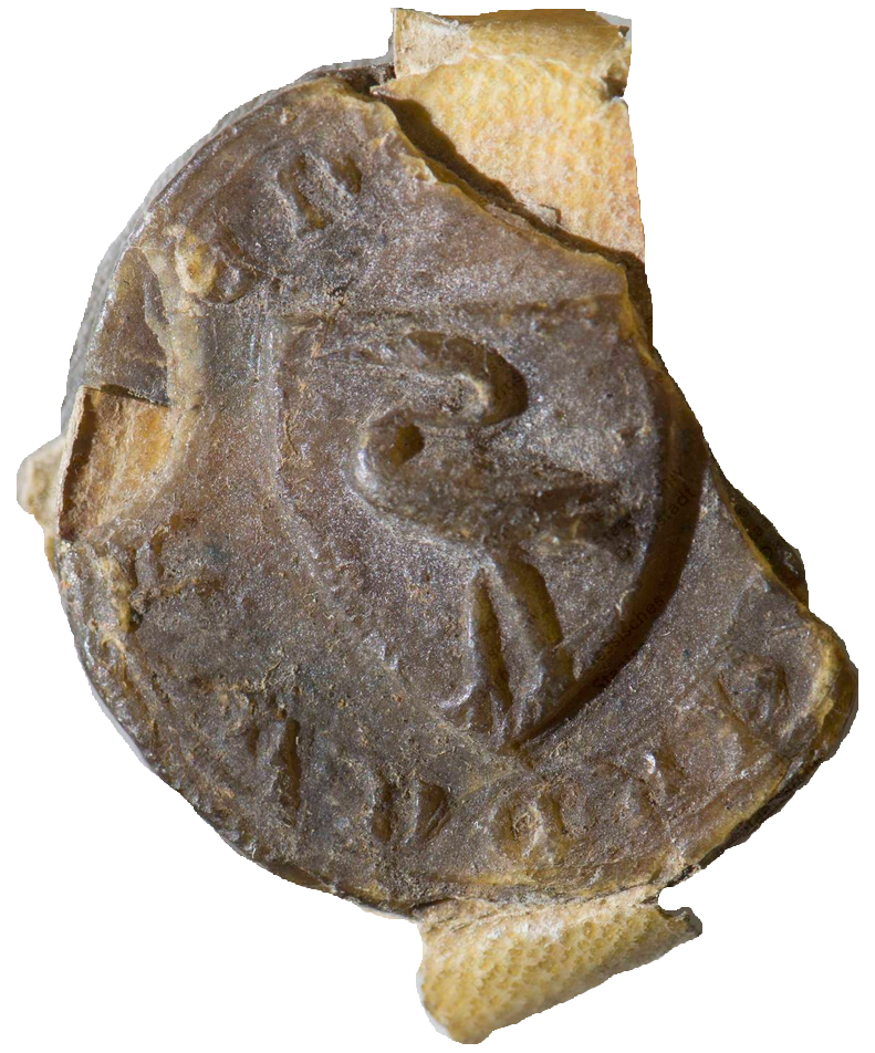 Siegelrest mit Wappen der von Wasen unter einer Urkunde zu Sickenhofen vom 8. September 1414 (HStAD, Bestand A1 Nr 211/1, Siegelbild) enhanced/digital reworked by commander-pirx